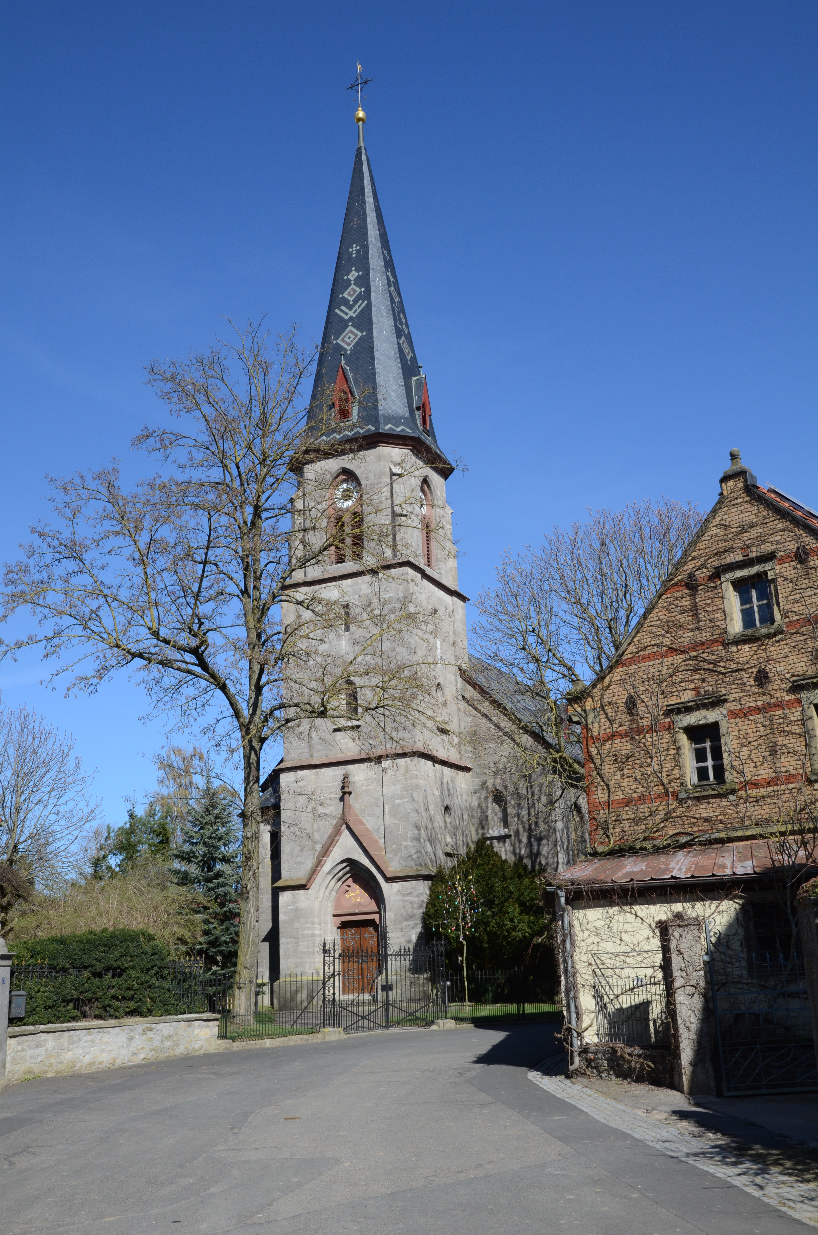 evang.-luth. Kirche in Westheim